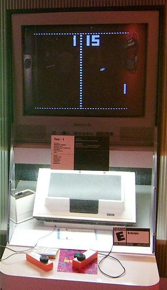 Magnavox Odyssey gaming console playing Pong / and Pong